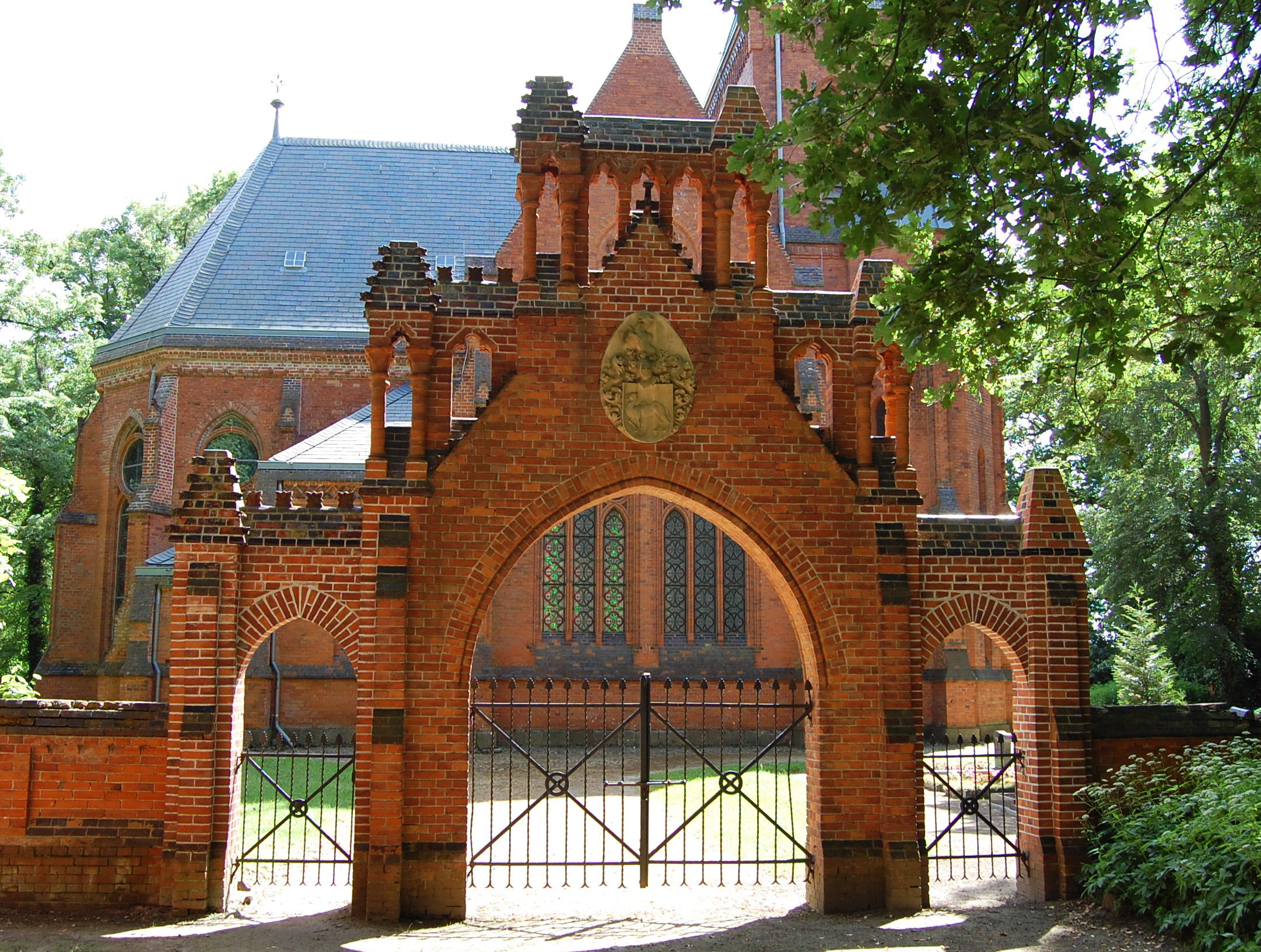 Gutskirche Vollenschier, Tor